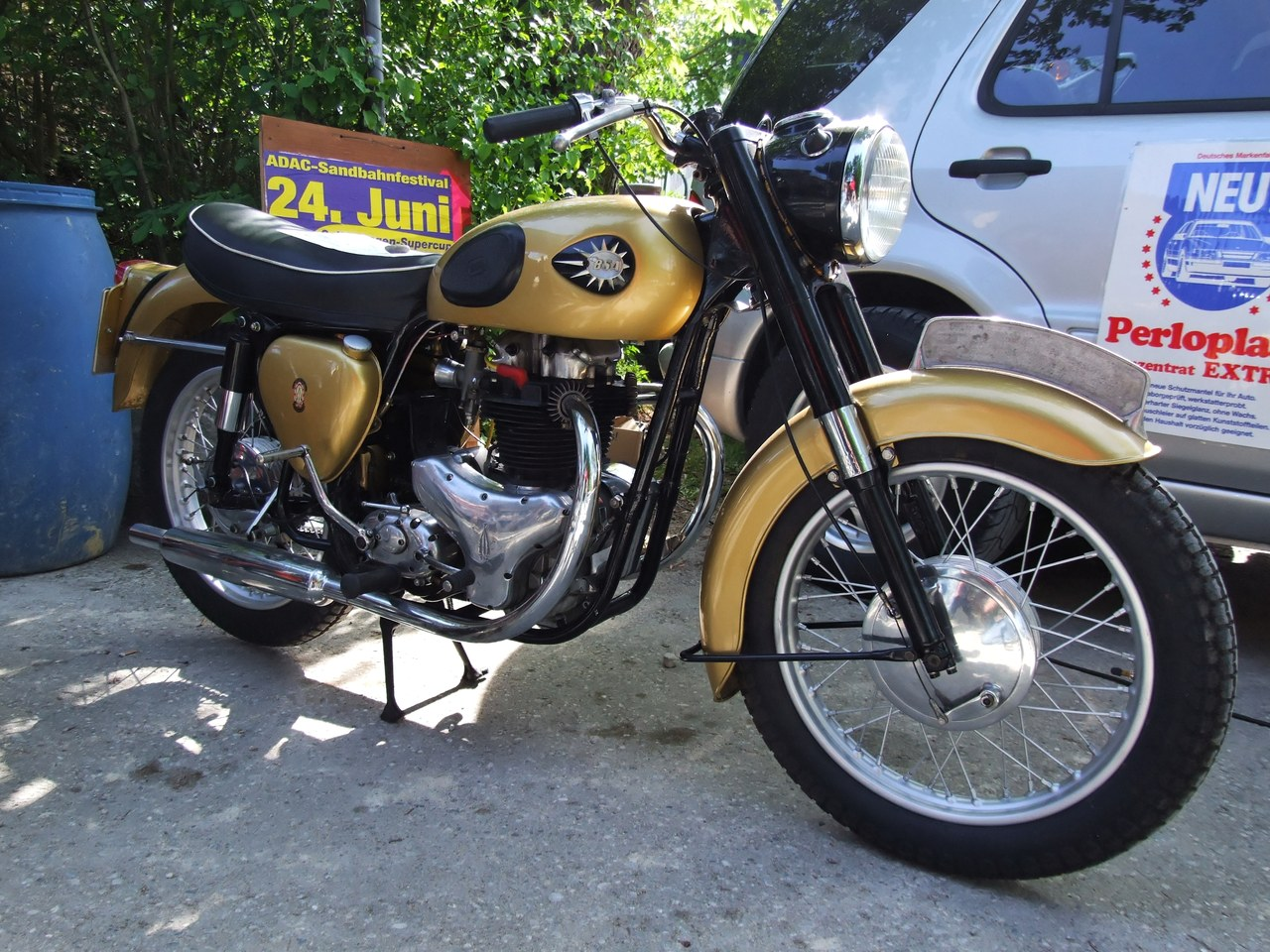 Quelle: selbst fotografiert, 04/2007 Fotograf: Späth Chr.